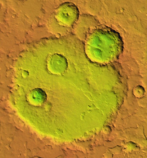 Cráter marciano Schmidt. (Imagen IAU/USGS/Goddard/A SU/USGS)